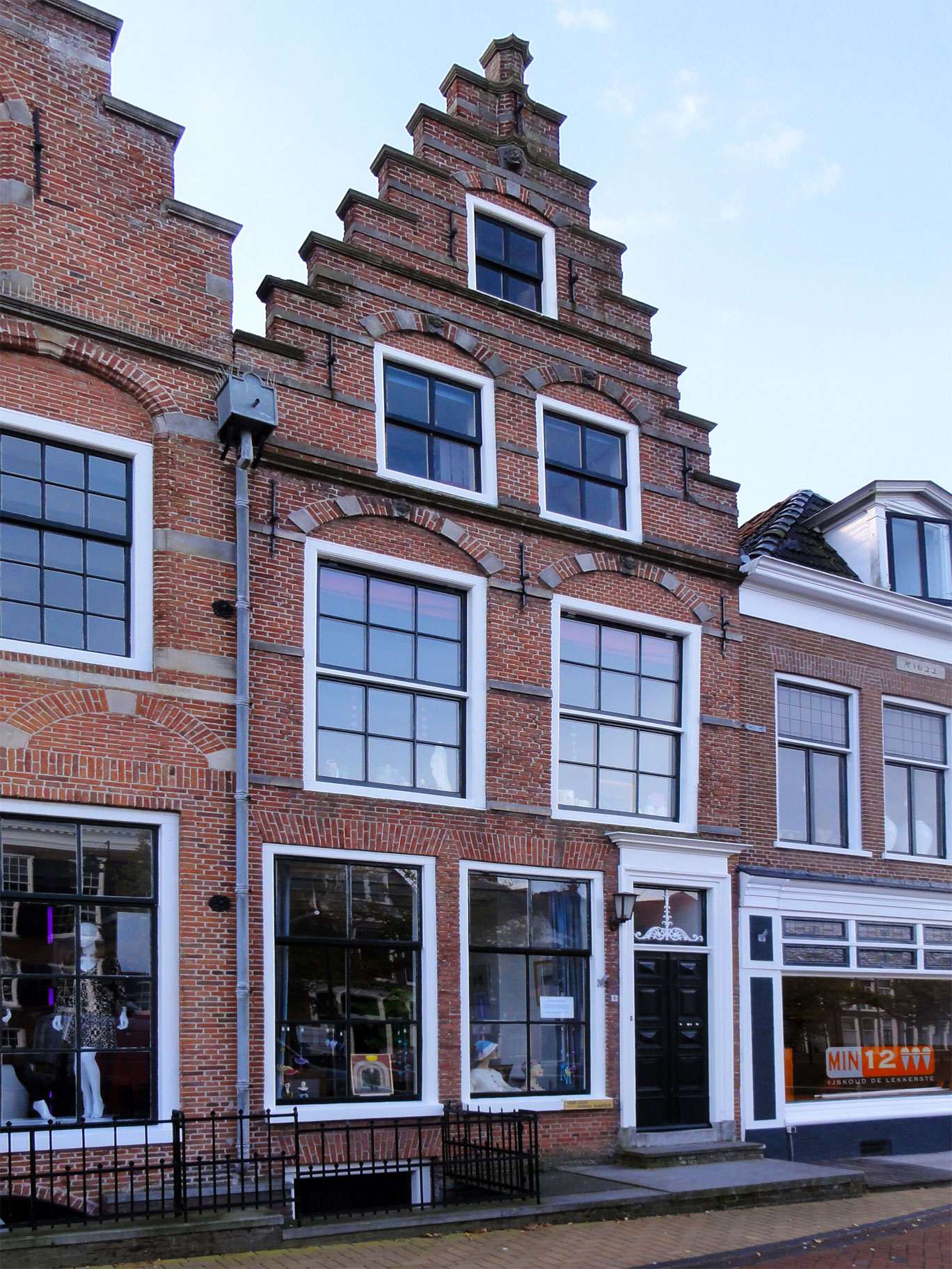 De Zijl 5 Dokkum. rijksmonument